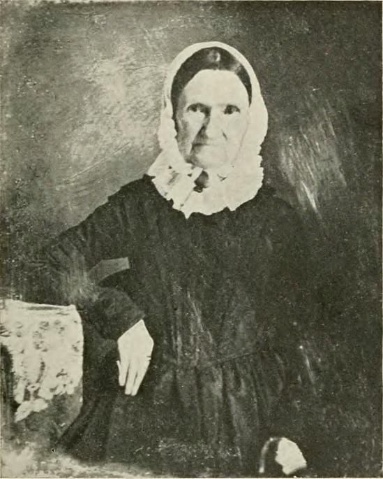 Electronic reproduction